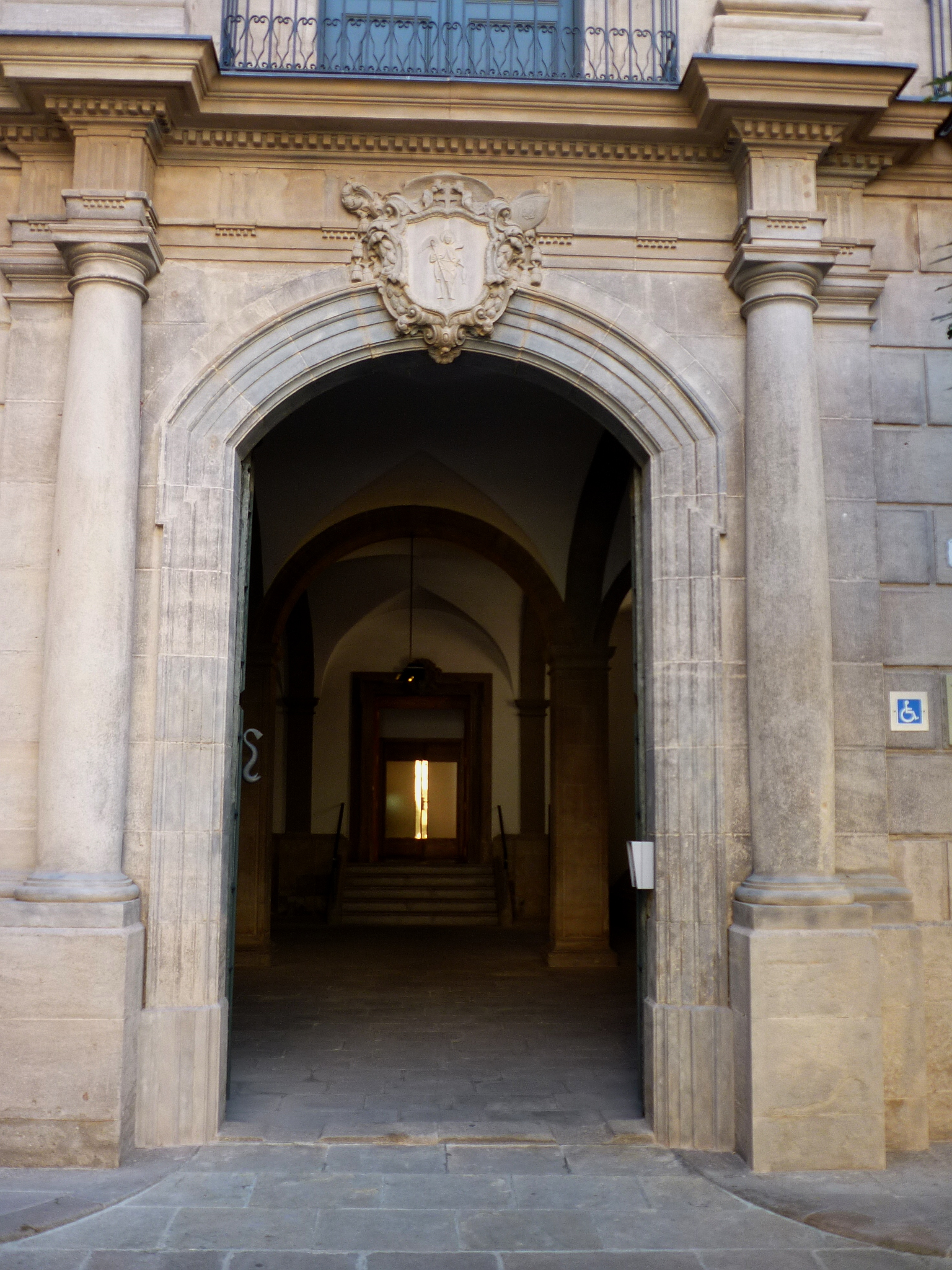 Palau Episcopal (Solsona):portal